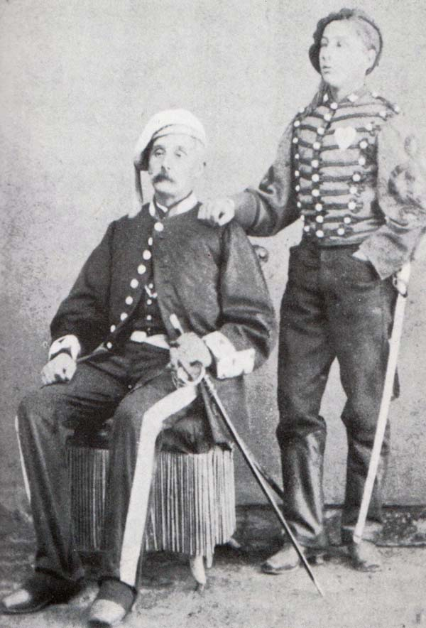 Francesc Solà i Madriguera, de Taradell (Osona), amb el seu fill, vers el 1870. El fill porta l'uniforme del batalló de zuaus i du cosit un "atura't bala" (detente bala) al pit.